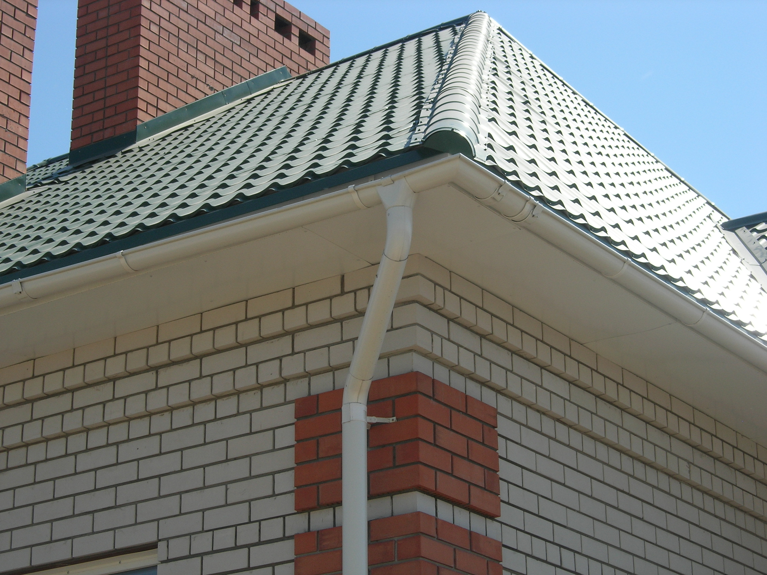 Водосточная система. Крыша